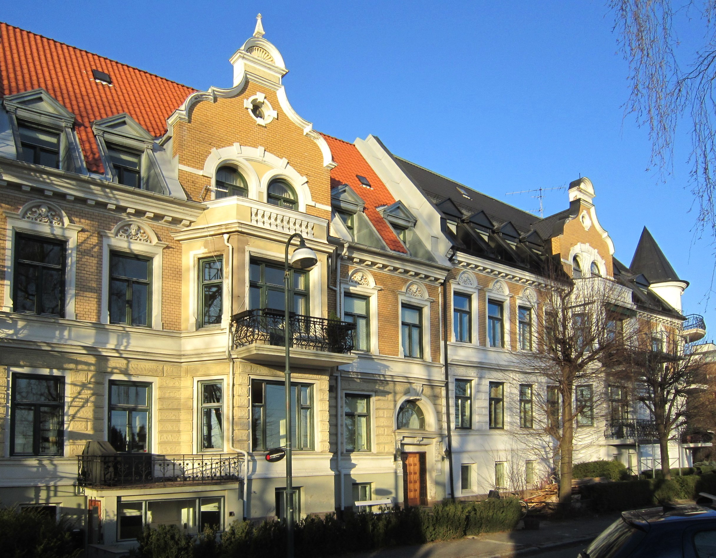 Bjørn Farmanns gate 4 og 6, med inngang fra Skarpsnogata